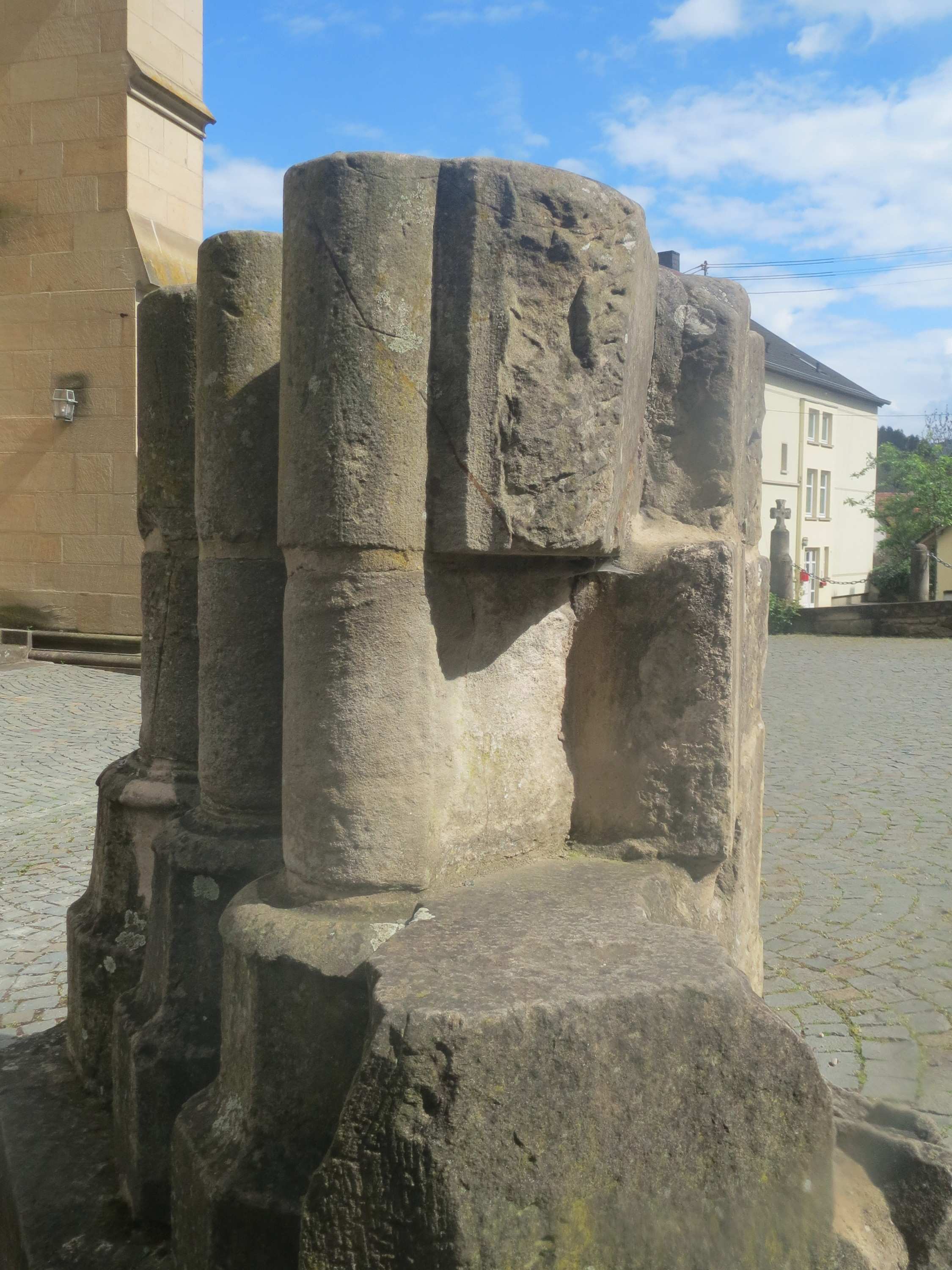 Pfeiler der Protestantischen Kirche in Offenbach am Glan vom ursprünglich längerem Langhaus